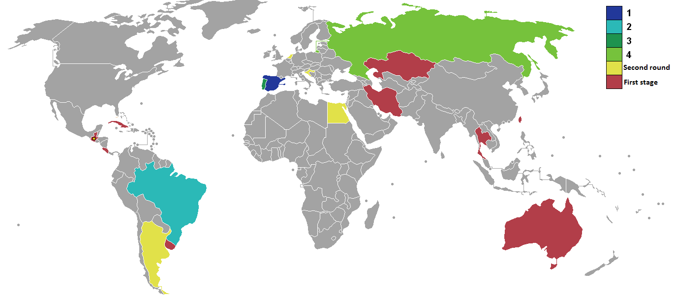 Ebon: Mapa de los resultados del torneo.